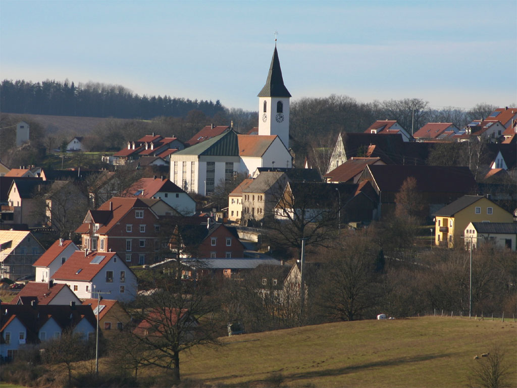 Gebenbach, Blick aus Richtung Hirschau auf die Ortsmitte; Originalgröße: 3072 x 2048 (herunterskaliert, zugeschnitten & verhimmelblaut)